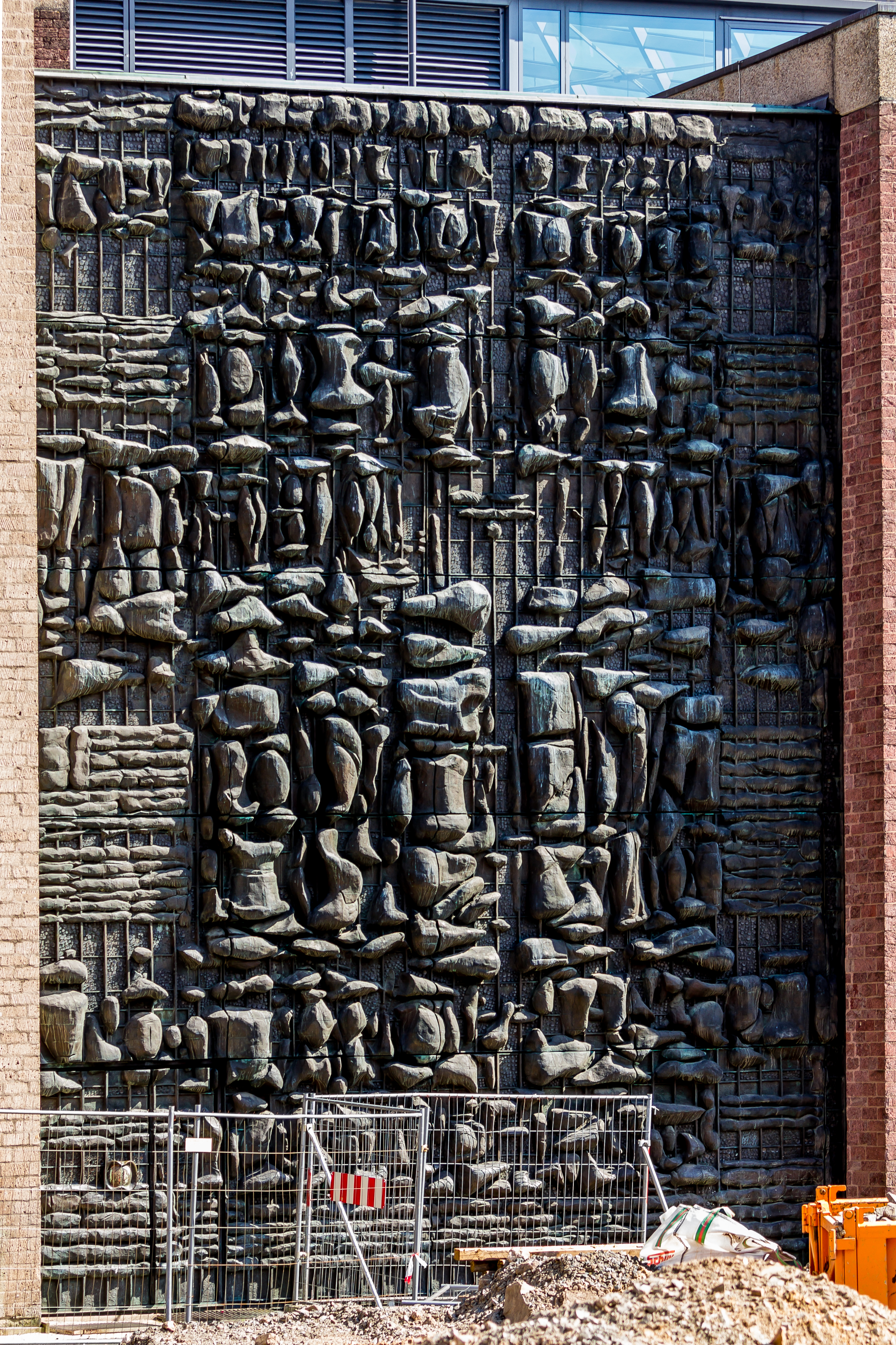 Relief/Bauplastik als Verbindung zwischen der Rathausvorhalle/Renaissancelaube (im Norden) und dem neuen Verwaltungsbau (im Süden)